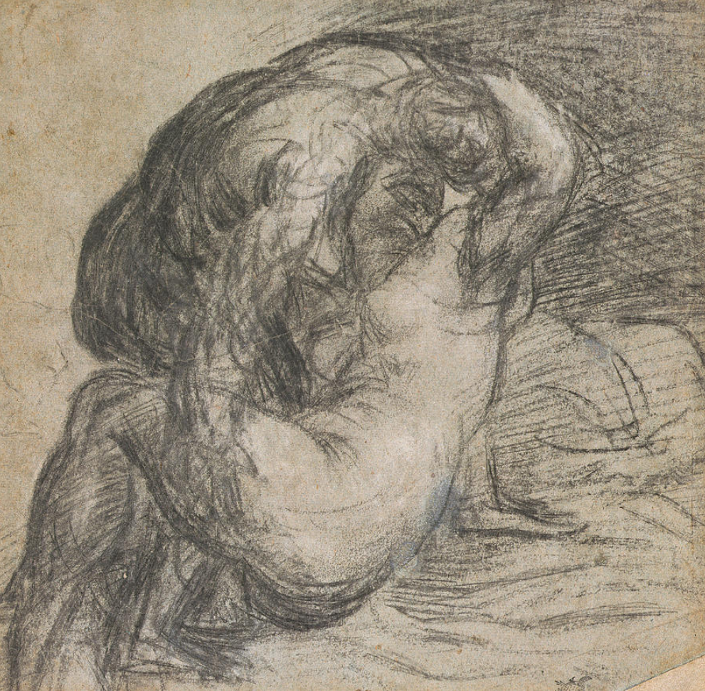 Disegno di Tiziano, Una coppia di amanti - Cambridge, The Fitzwilliam Museum